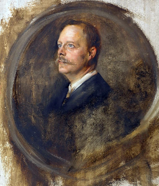 Porträtstudie des Herrn Chamberlain. Mischtechnik auf Karton. 80 x 70 cm